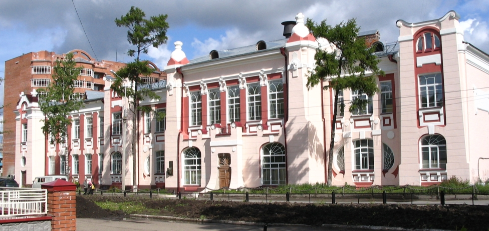 Здание Учительского института (ныне 2-й корпус ТГПУ (ул. Киевская, 62а)